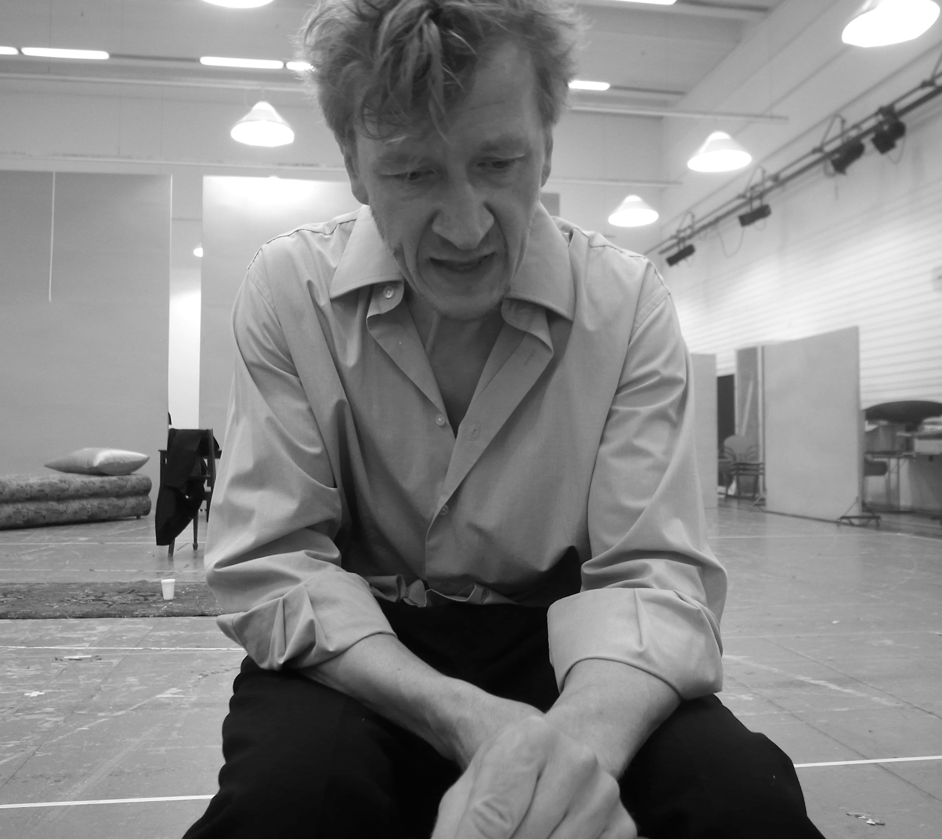 Rehearsals